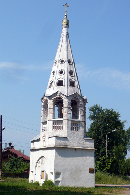 Сохранившаяся постройка Введенского монастыря, колокольня Введенской церкви, выстроена в 1680-1682 годах ярославскими мастерами по заказу думного дьяка С. И. Заборовского.